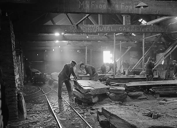 Teitl Cymraeg/Welsh title: Chwarel y Foty (Oakeley), Blaenau Ffestiniog Ffotograffydd/Photographer: Geoff Charles (1909-2002) Dyddiad/Date: 3/2/1950 Cyfrwng/Medium: Negydd ffilm / Film negative Cyfeiriad/Reference: (gch00204) Rhif cofnod / Record no.: 3367295 Rhagor o wybodaeth am gasgliad Geoff Charles yn Llyfrgell Genedlaethol Cymru More information about the Geoff Charles Collection at the National Library of Wales Mae ffotograffau Geoff Charles hefyd yn rhan o Broject Europeana Libraries Geoff Charles' photographs also form part of the Europeana Libraries Project